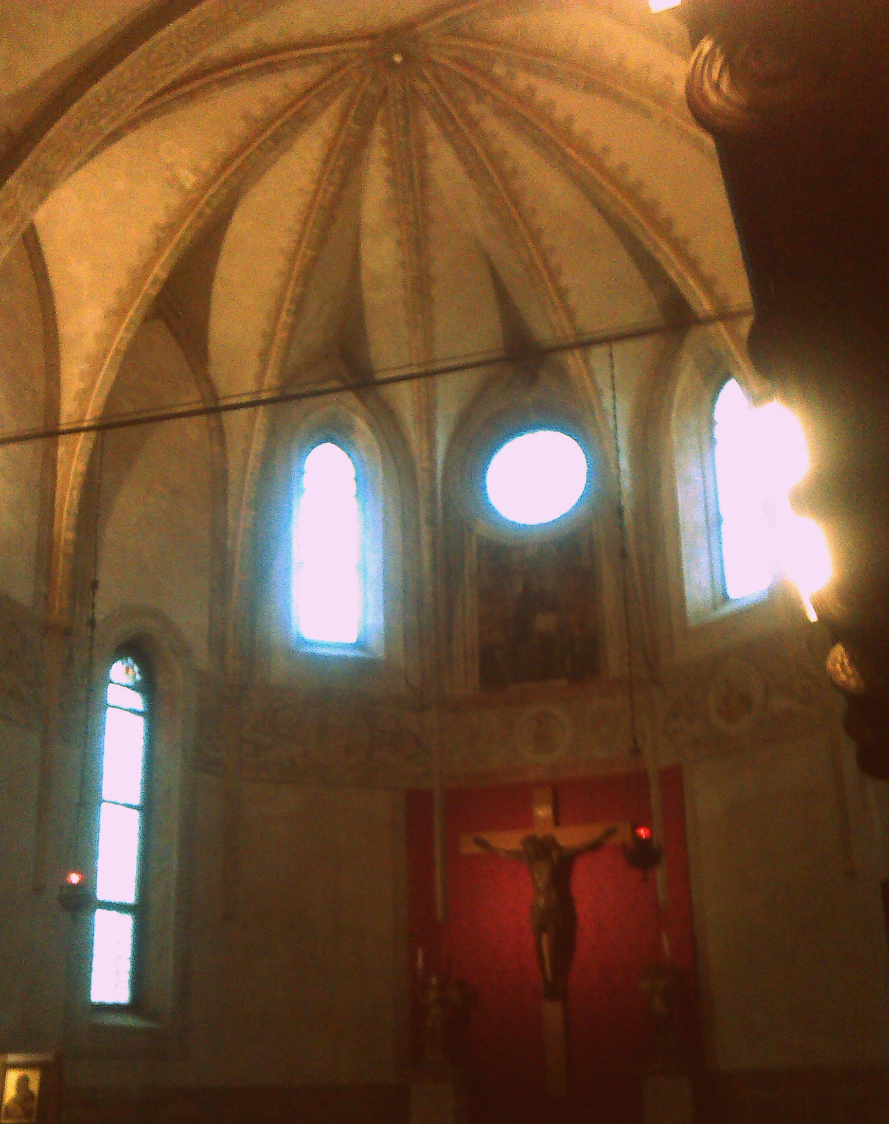 coro vecchio, basilica di santa giustina, padova